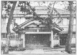 鳳至郡役所の画像